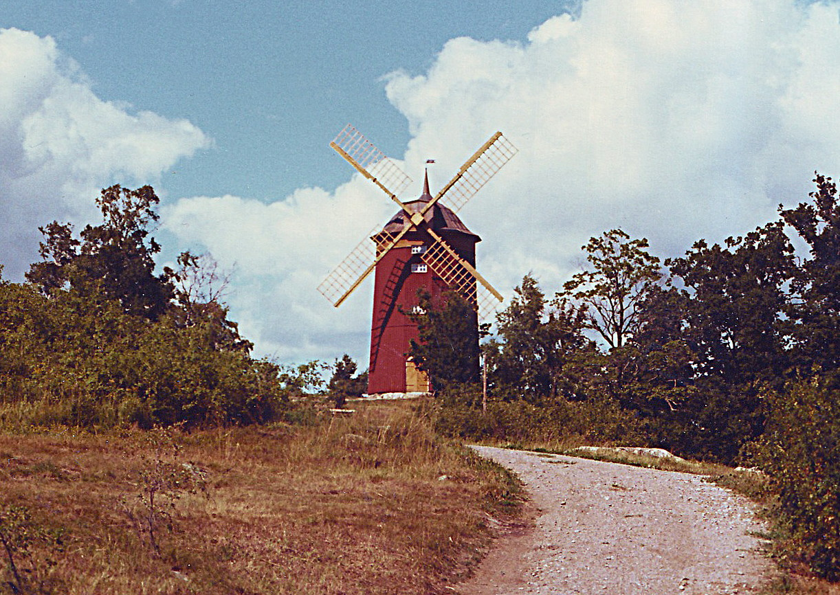 Kvarnen I Jakobsberg sent 1970-tal eller tidigt 1980-tal.